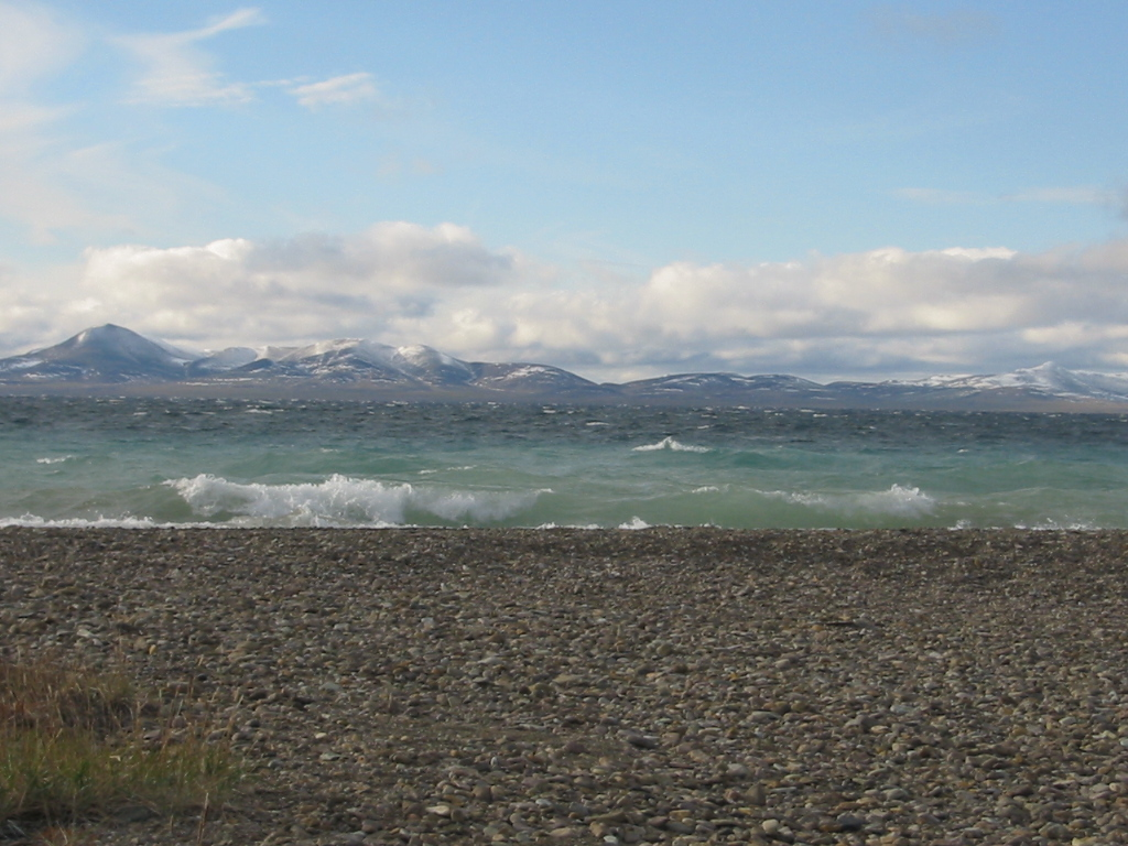 Storm, El'gygytgyn lake